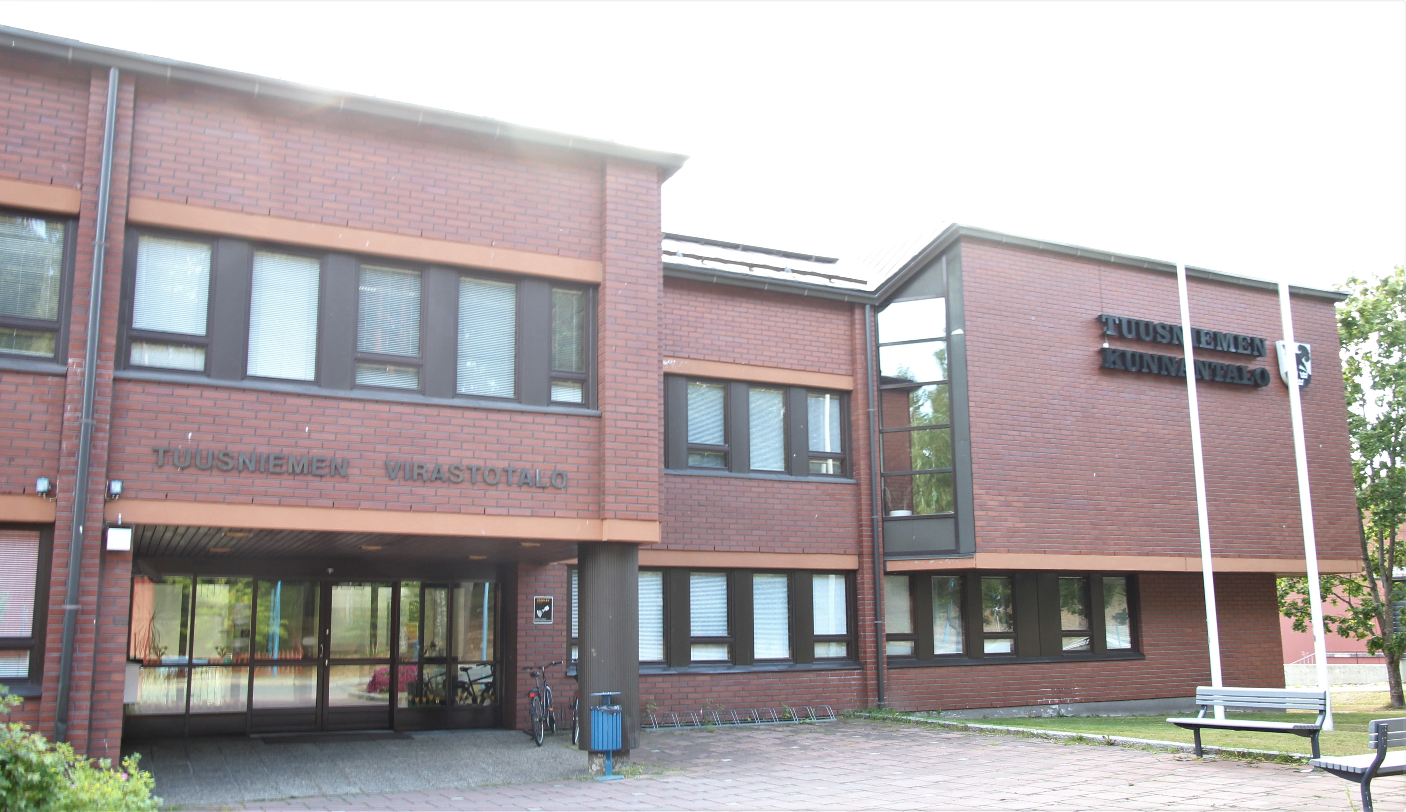 Tuusniemen kunnantalo on pohjoissavolaisen Tuusniemen kunnan kirkonkylällä sijaitseva hallinto- ja virastorakennus. Sen osoite on Keskitie 22, 71200 Tuusniemi.